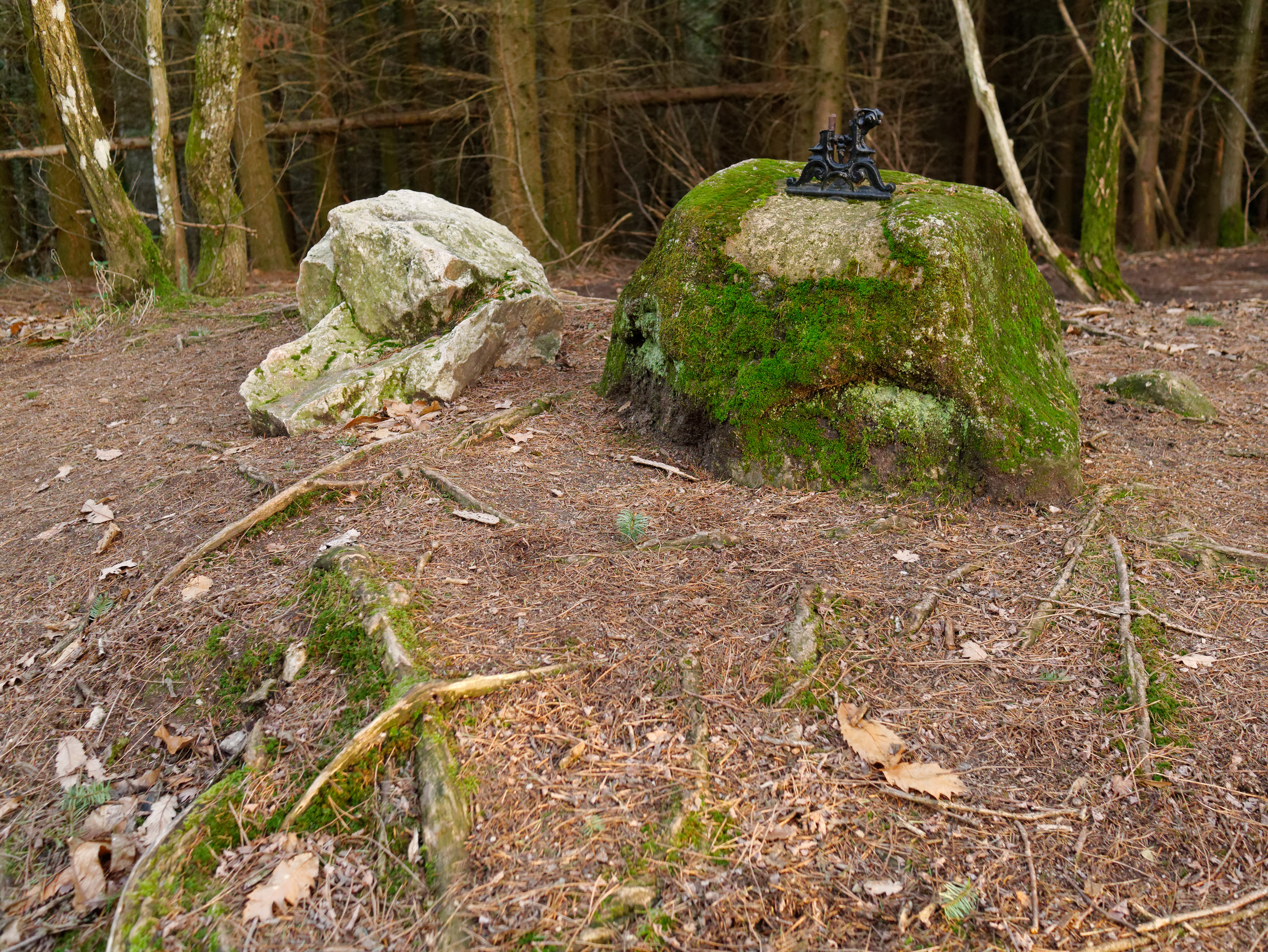 Pierres du Pas-du-loup, dont l'une porte une marque traditionnellement considérée comme une empreinte de loup, et l'autre une croix qui a été brisée. Paslières, Auvergne, France.